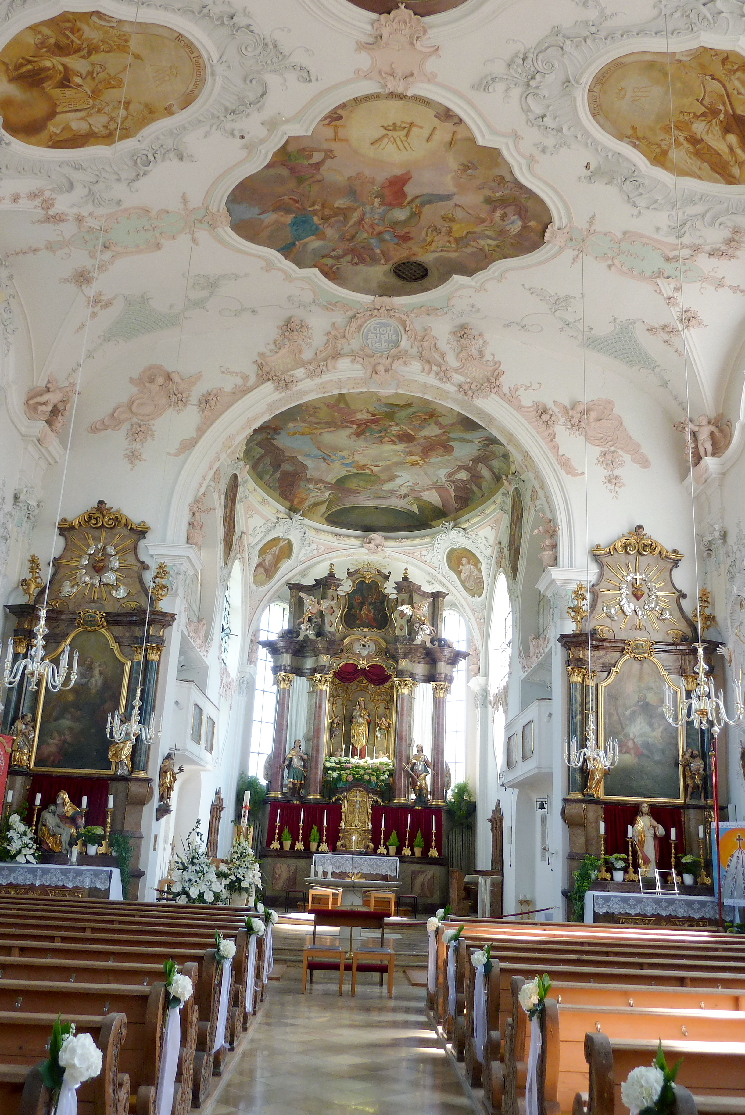 Katholische Pfarrkirche St. Georg in Westendorf, einer Gemeinde im Landkreis Augsburg (Bayern), Innenraum mit Blick zum Chor, Fresken von Johann Georg Wolcker (1740), Stuck von Ignaz und Johann Baptist Finsterwalder mit Farbfassung von Johann Jacob Schubarth (1740)